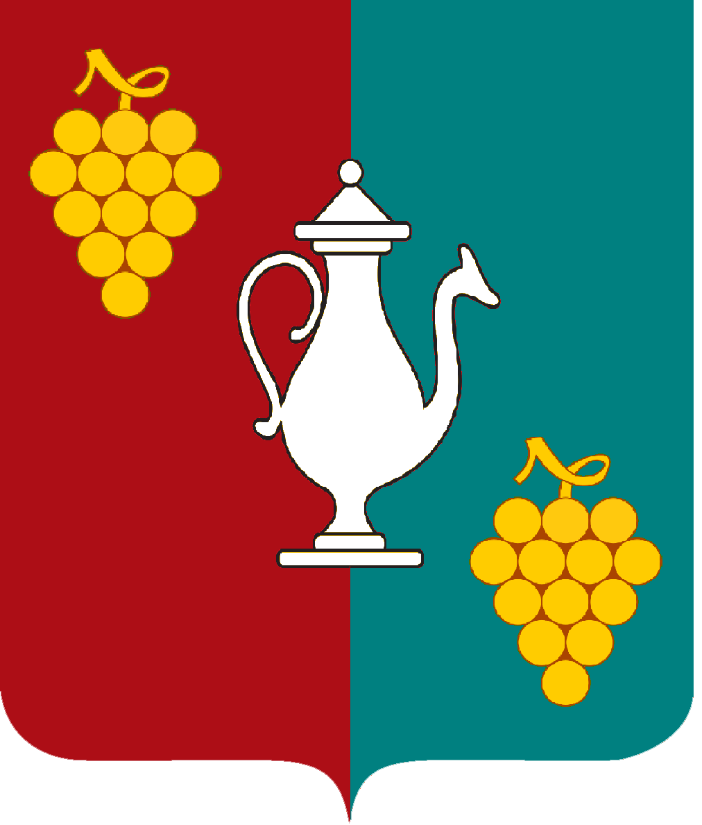 Официальный герб Шамкира ссылается на официальный сайт [1] и [2]